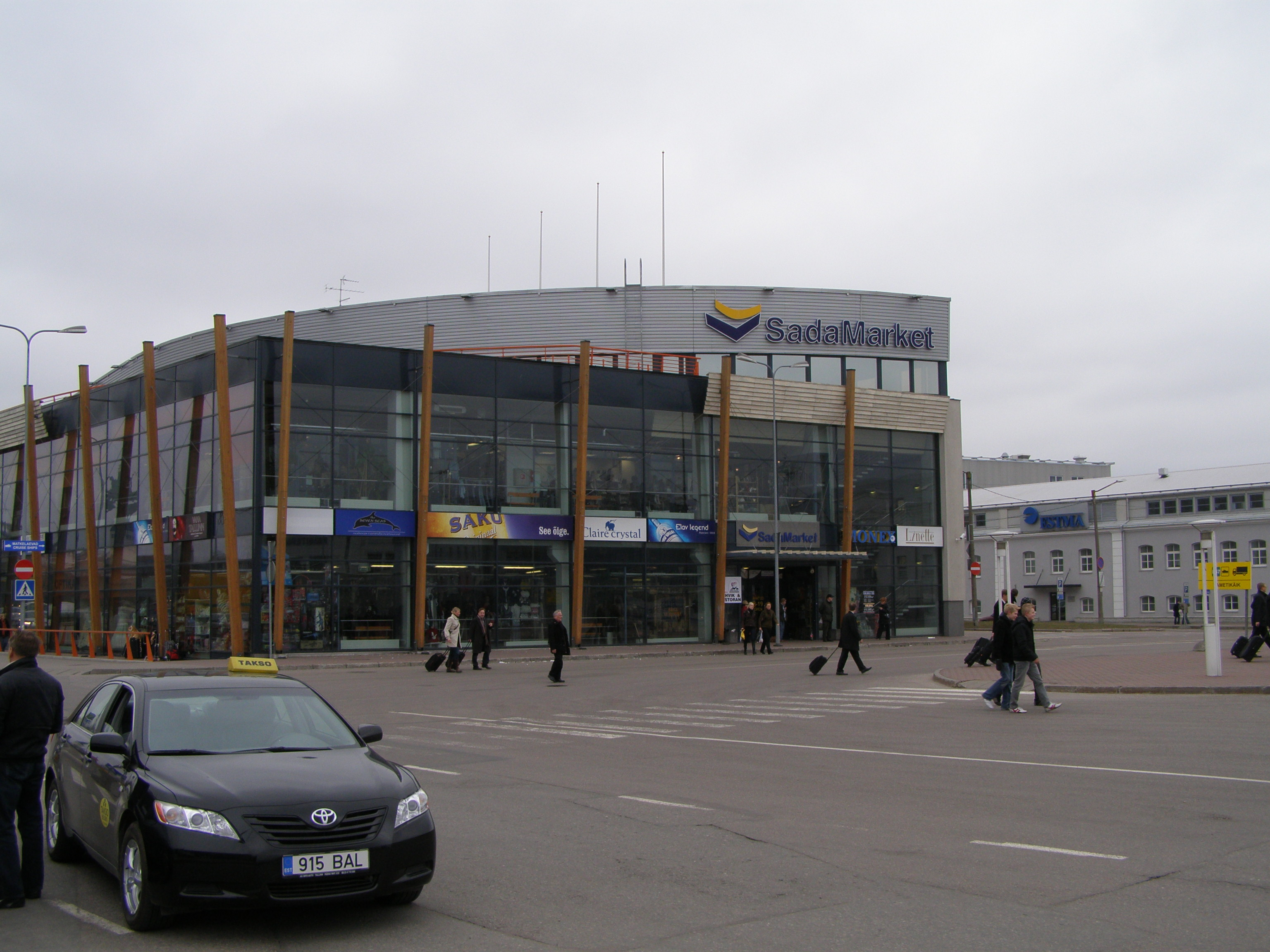 SadaMarket